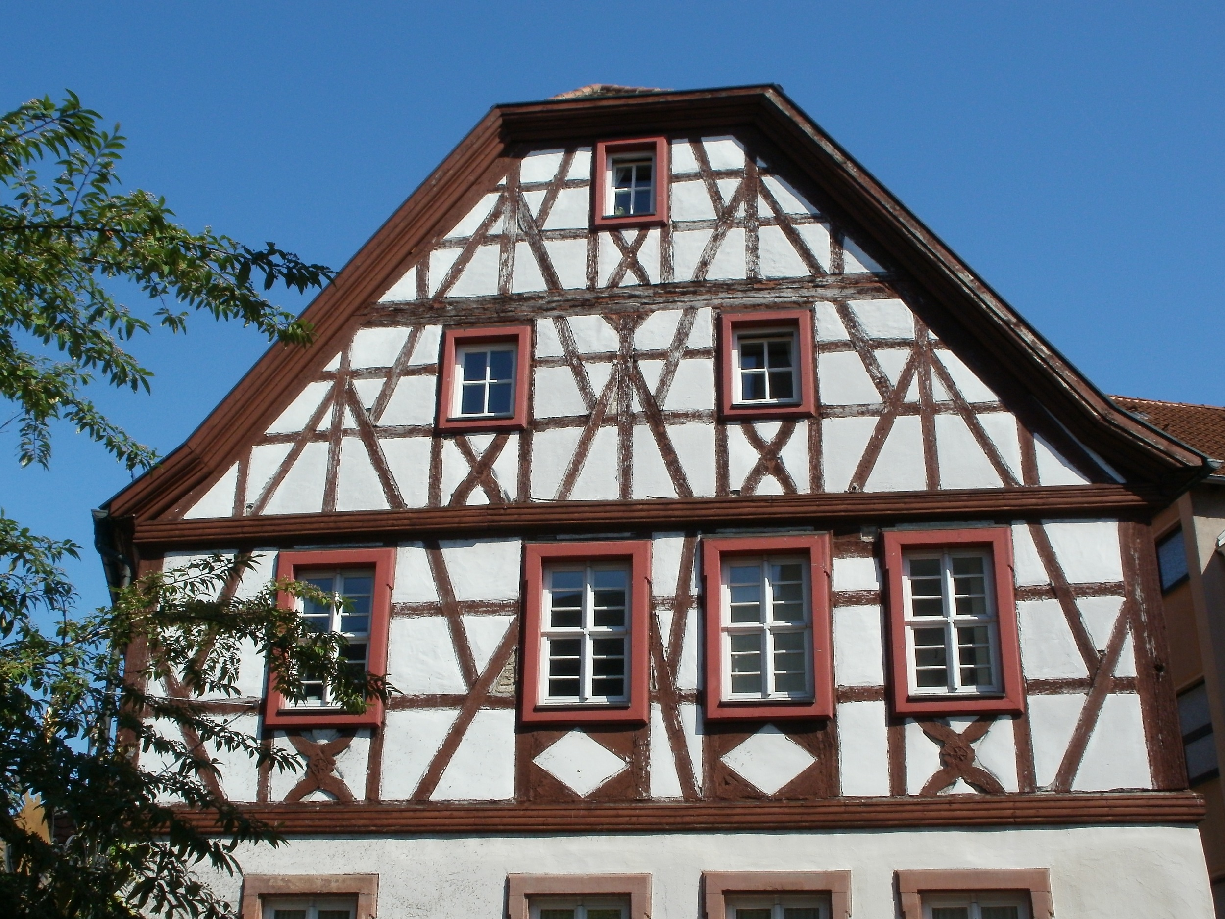 Gasthaus Engel (Hockenheim)